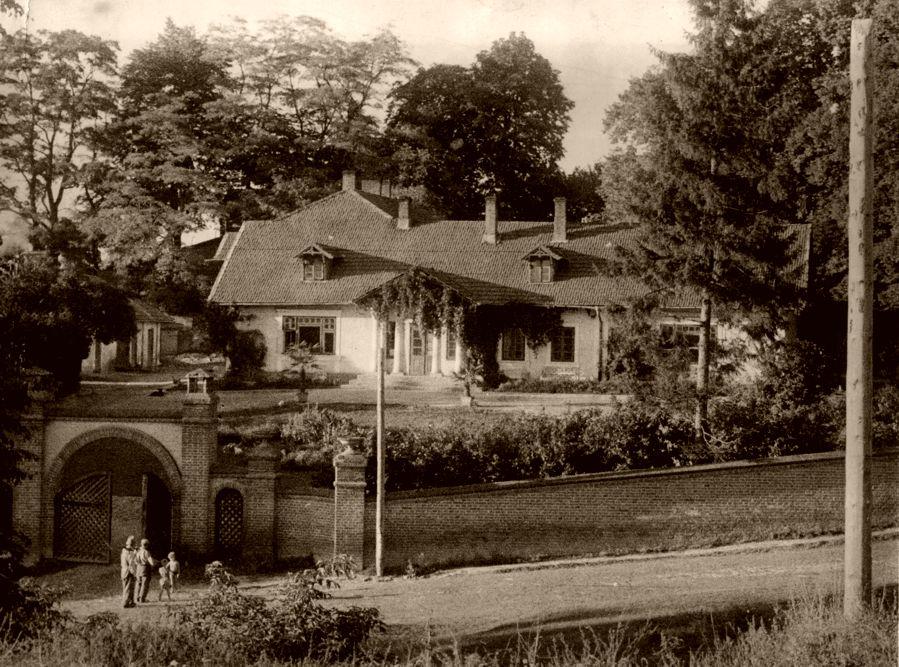 Manor in Odonów, Poland